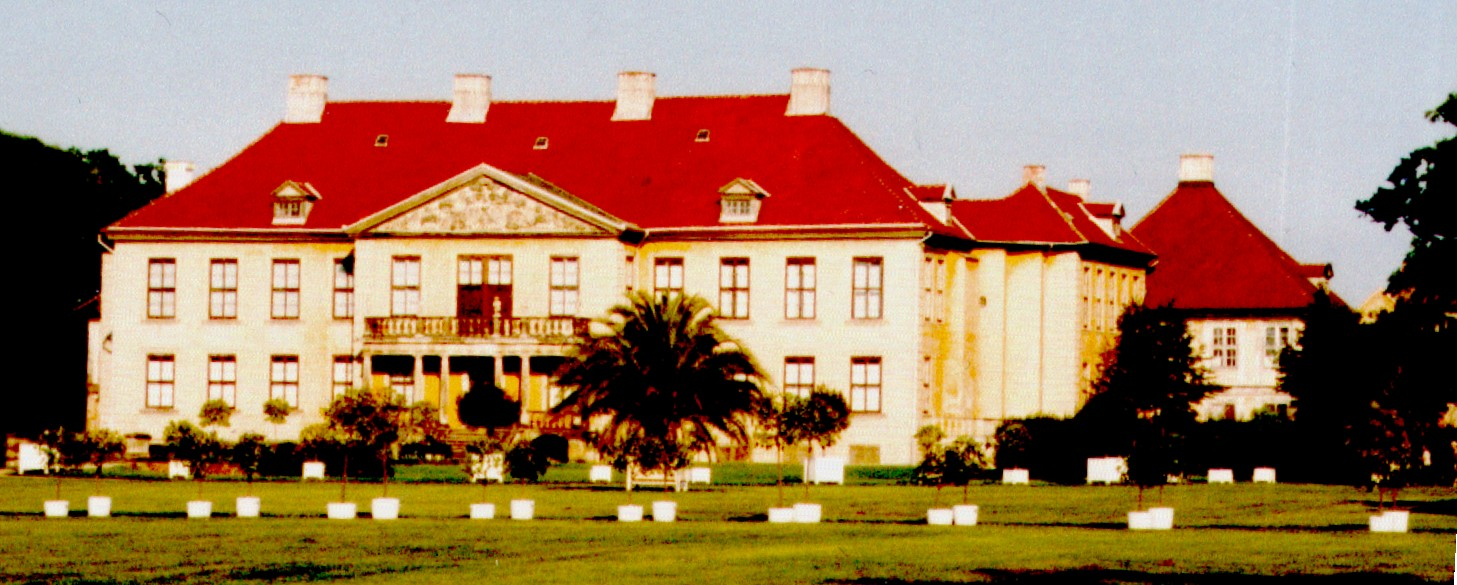 Schloß Oranienbaum (Sachsen-Anhalt) - Parkseite